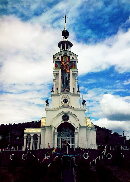 Храм Святителя Николая Мирликийского